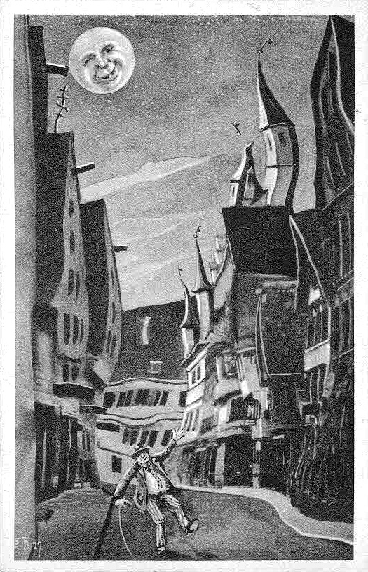 Ansichtskarte von Eugen Felle; Technoseum (Landesmuseum für Technik und Arbeit Mannheim)Motiv: Biberach an der Riß aus der Sicht eines Betrunkenen